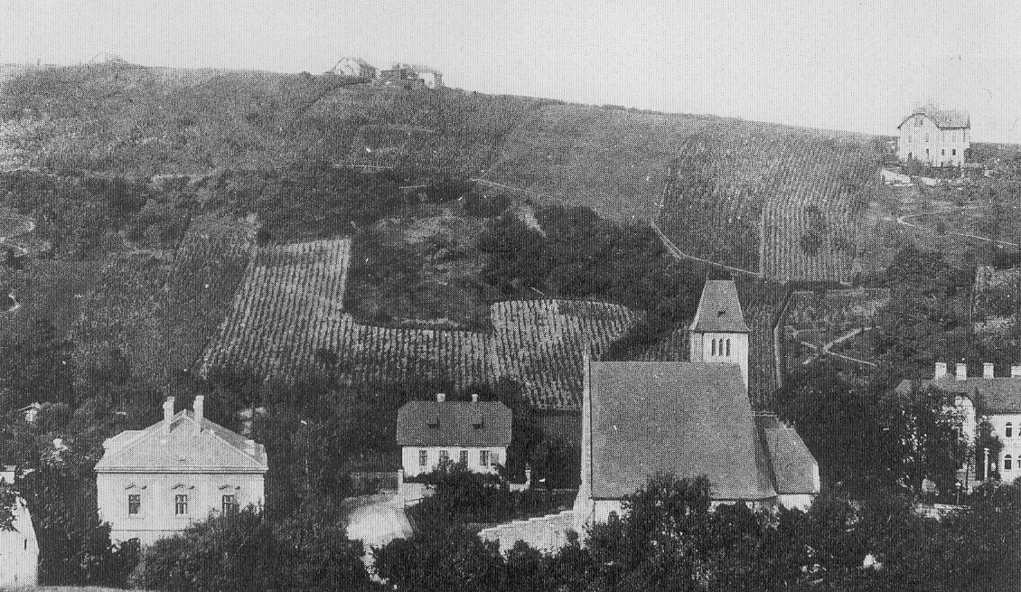 Sieveringer Pfarrkirche 1915